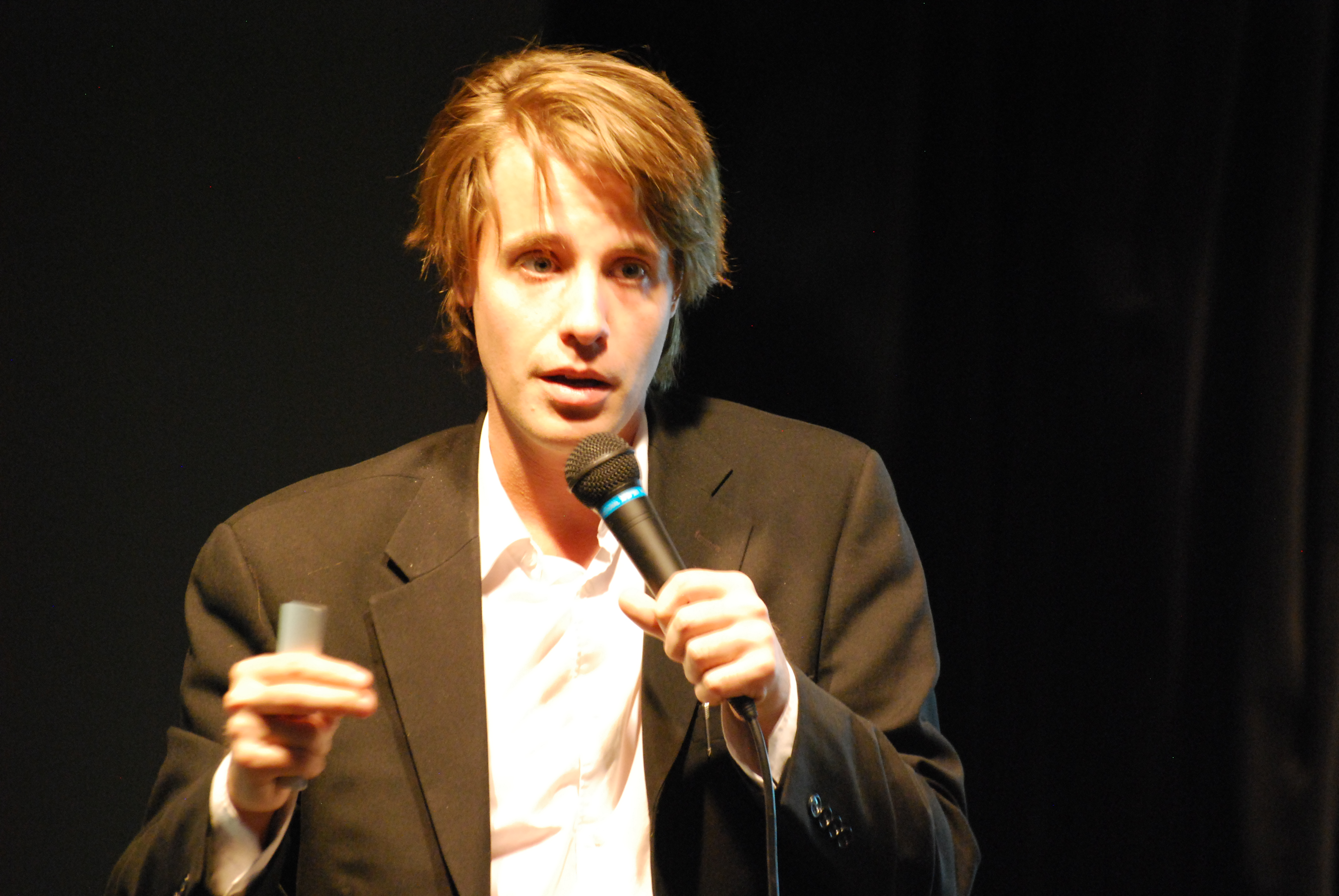 Simon Tremblay-Pepin, chercheur à l'Institut de recherche et d'informations socio-économiques.